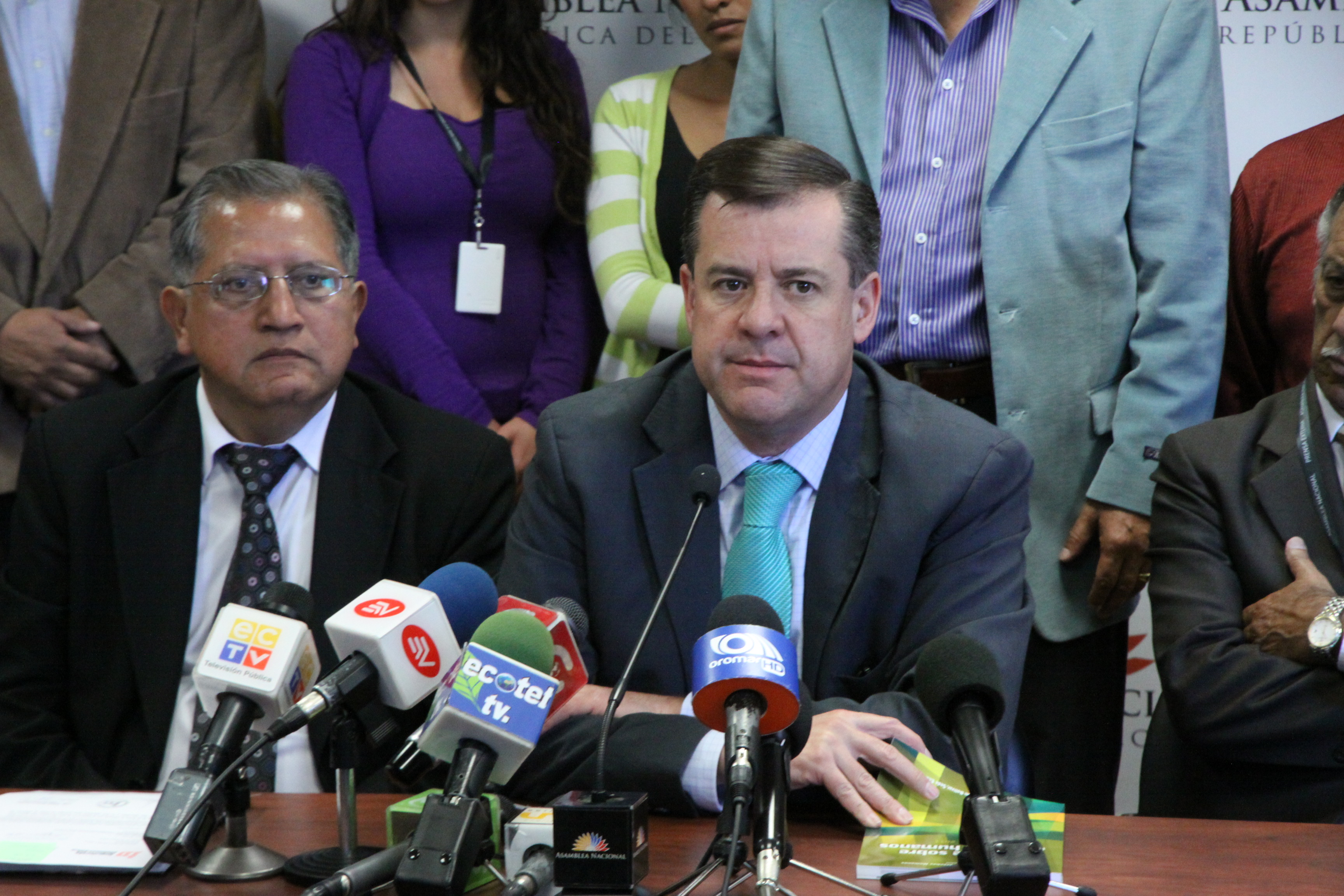 Foto: Hugo Ortiz Ron / Asamblea Nacional